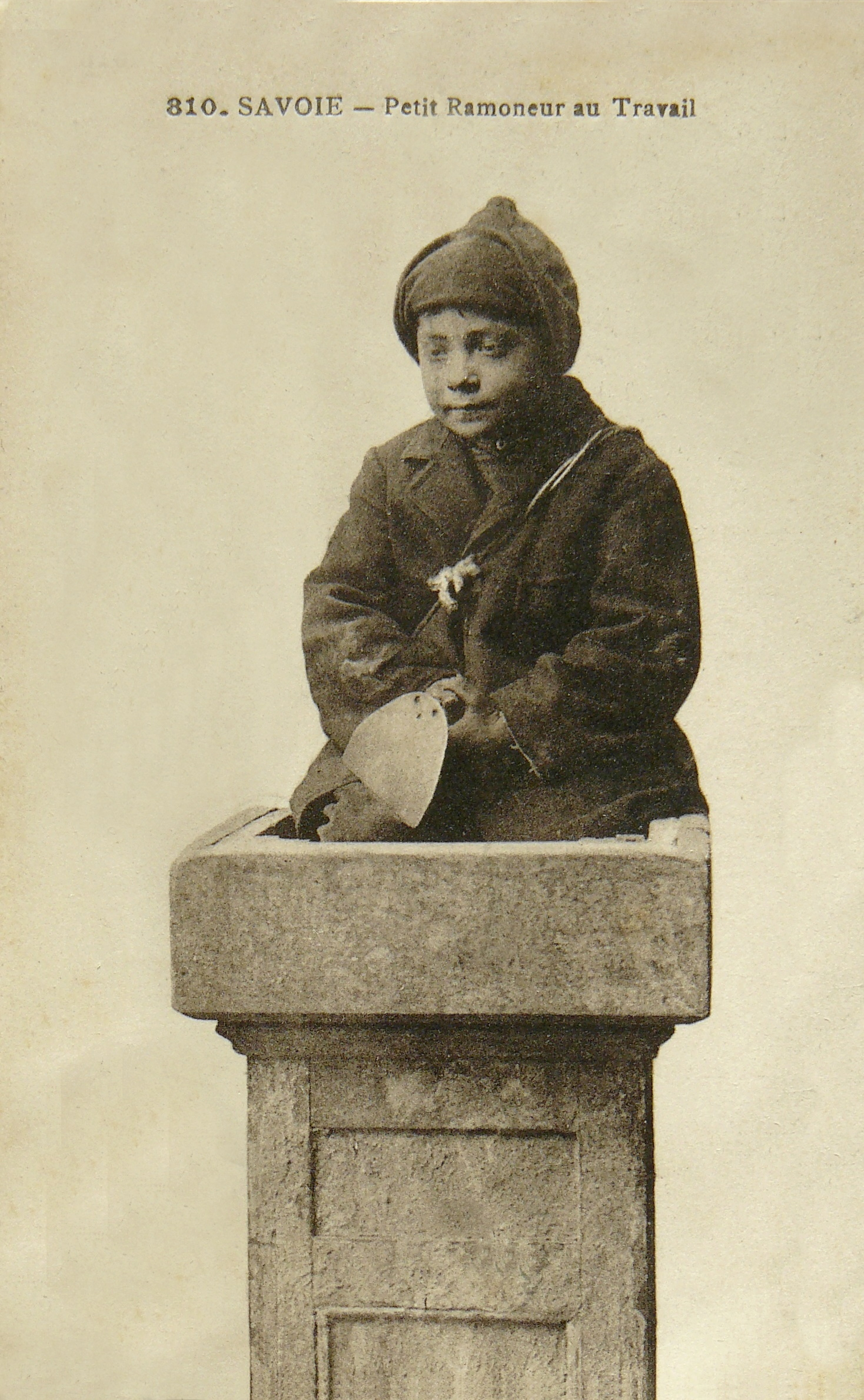 Carte postale ancienne - Petit ramoneur savoyard - D. Grimal, Chambéry, n°810 - Tampon postal au dos : 1910